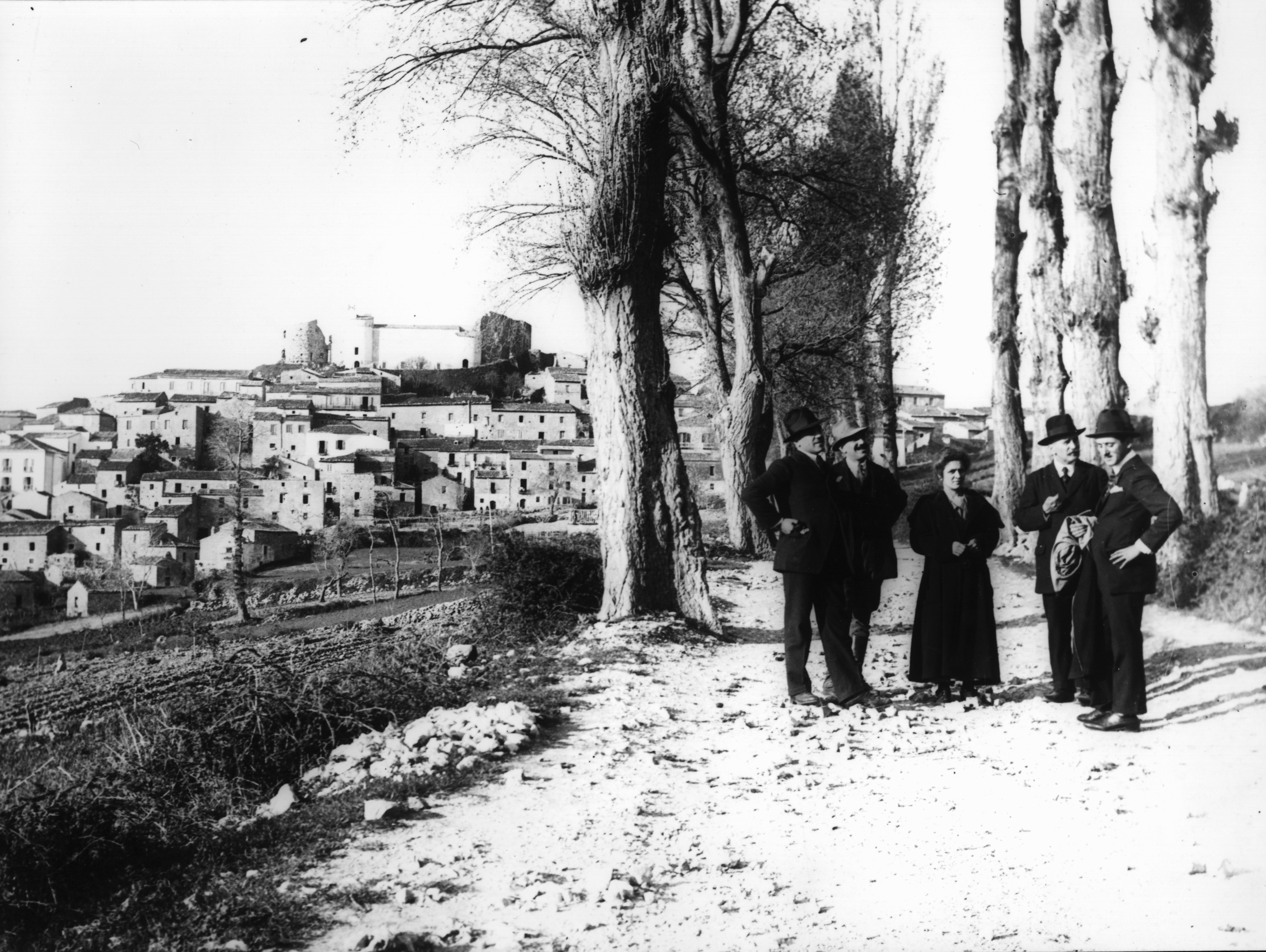 Foto d'epoca di Postiglione